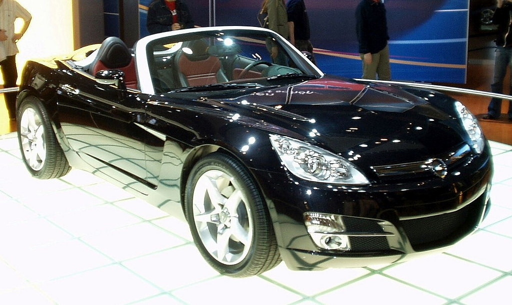 Opel GT Roadster